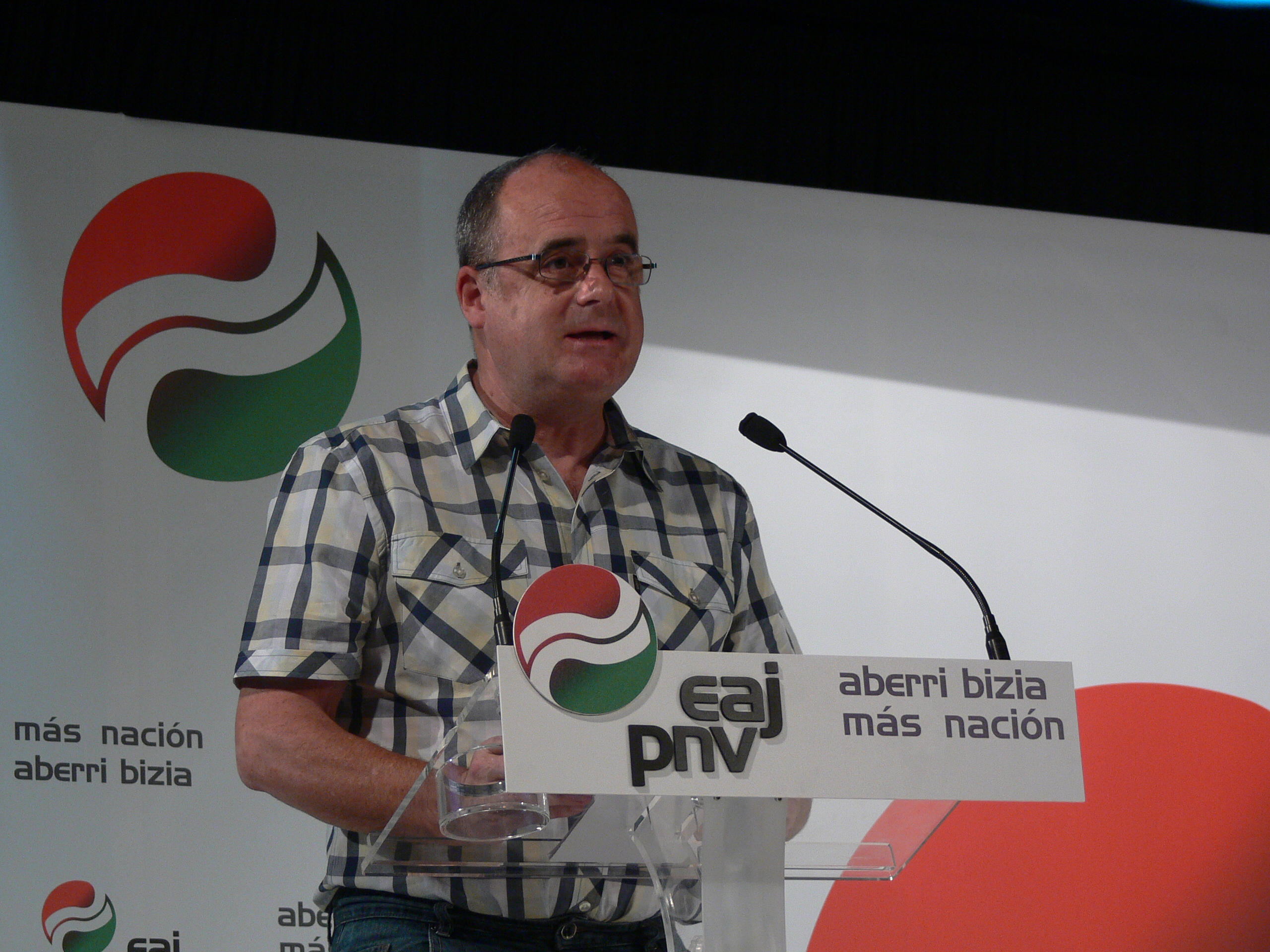 GBB berriak hurrengo urteetan gauzatu beharko dituen egitasmo eta erronkak azaltzeko egindako batzarra. Batzarra UPV-EHUren aularioan 2012ko ekainaren 23an gauzatu zen, Ignacio Maria Barriola eraikinean.